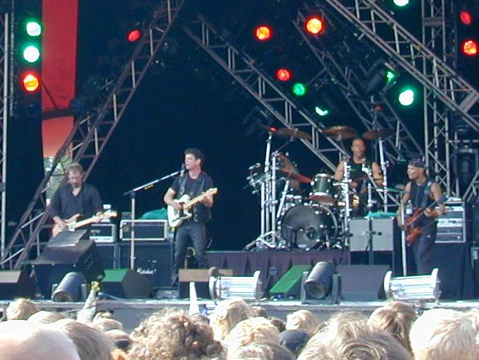 Lou Reed at Roskilde Festival 2000, Day 4.